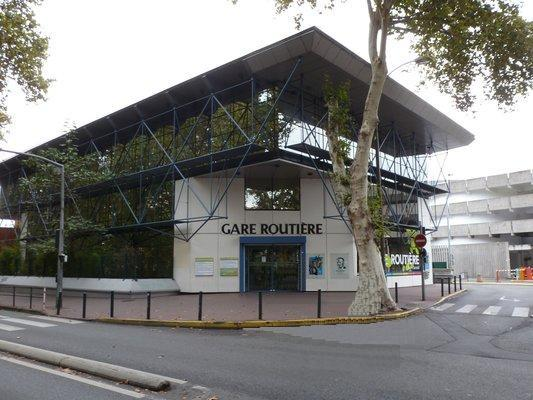 Gare routière de Toulouse (Haute-Garonne, France).